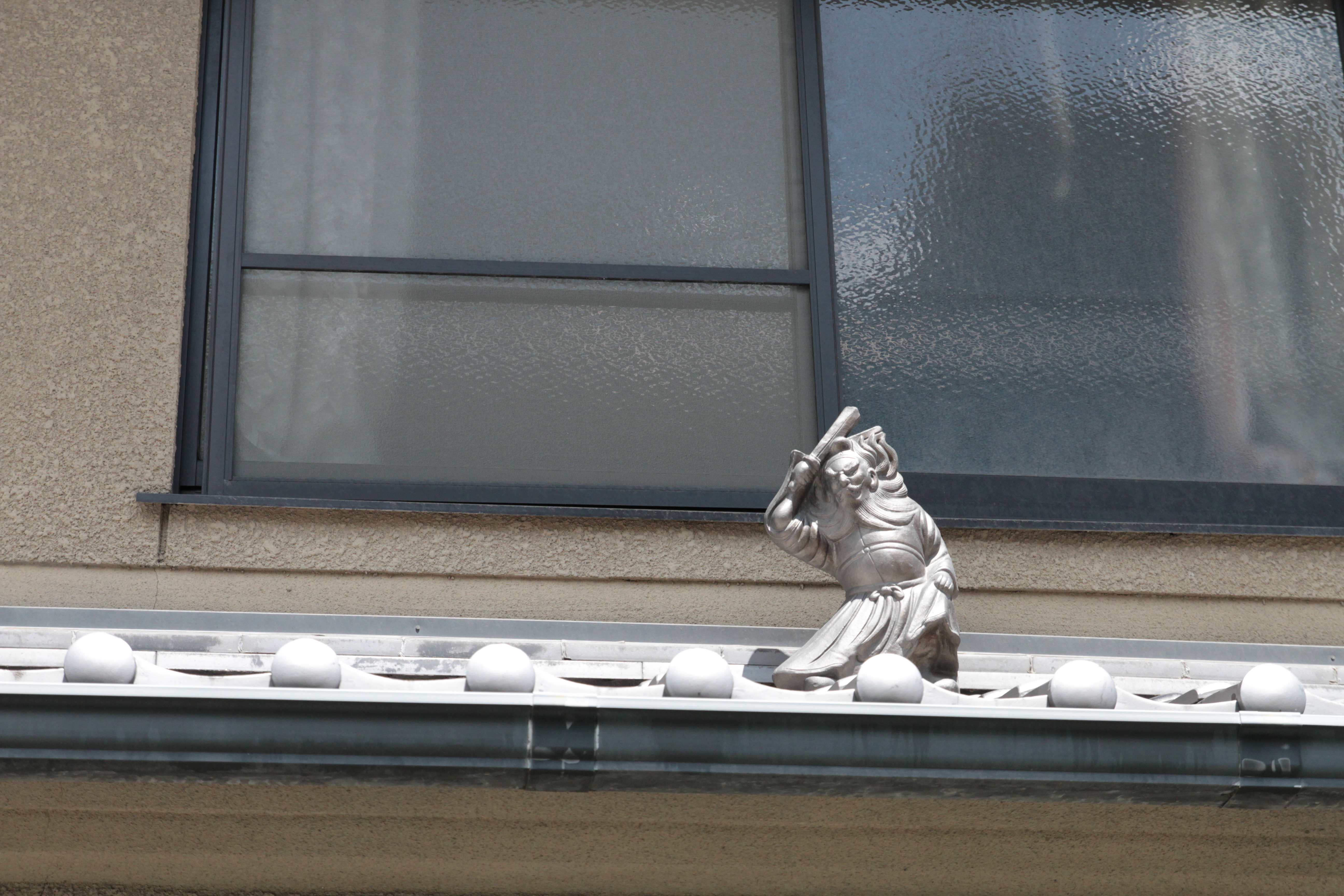 京町家の屋根に置かれている「鍾馗さん」と呼ばれる厄除けの人形。